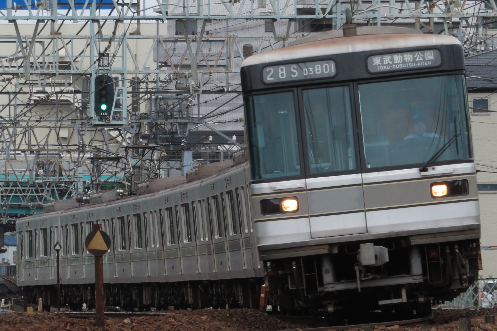 東京メトロ03系03-101F 東武スカイツリーライン西新井〜竹ノ塚